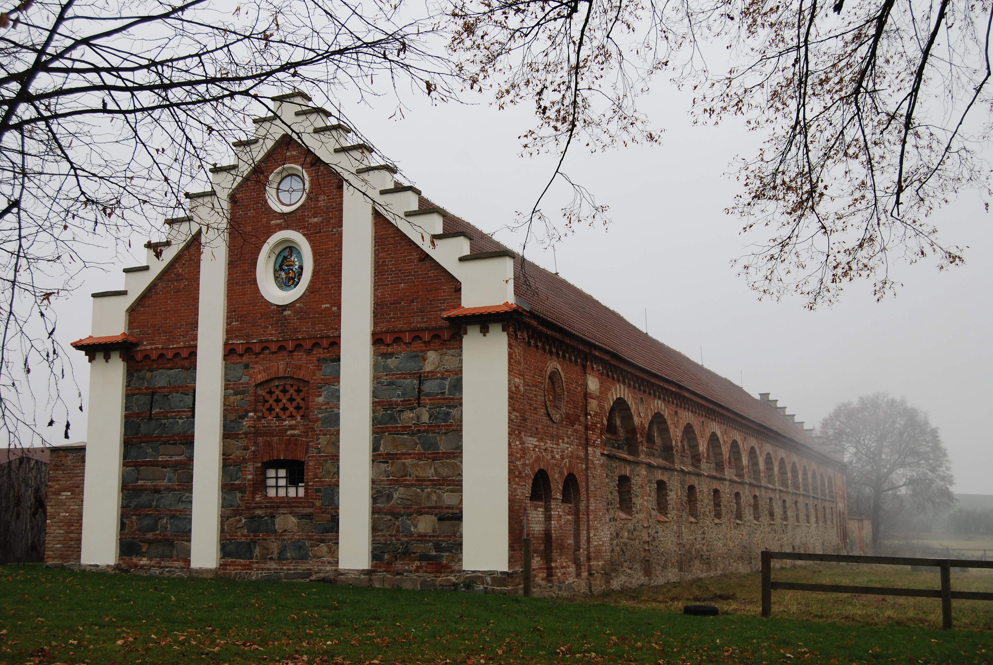 Sochovice je část města Mirovice v okrese Písek. Česká republika.